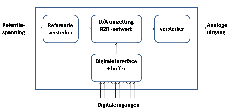 Schematische voorstelling van een Digital-to-analog converter